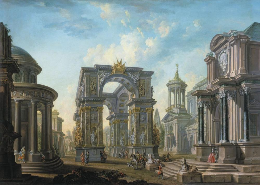 А. И. Бельский. Архитектурный пейзаж